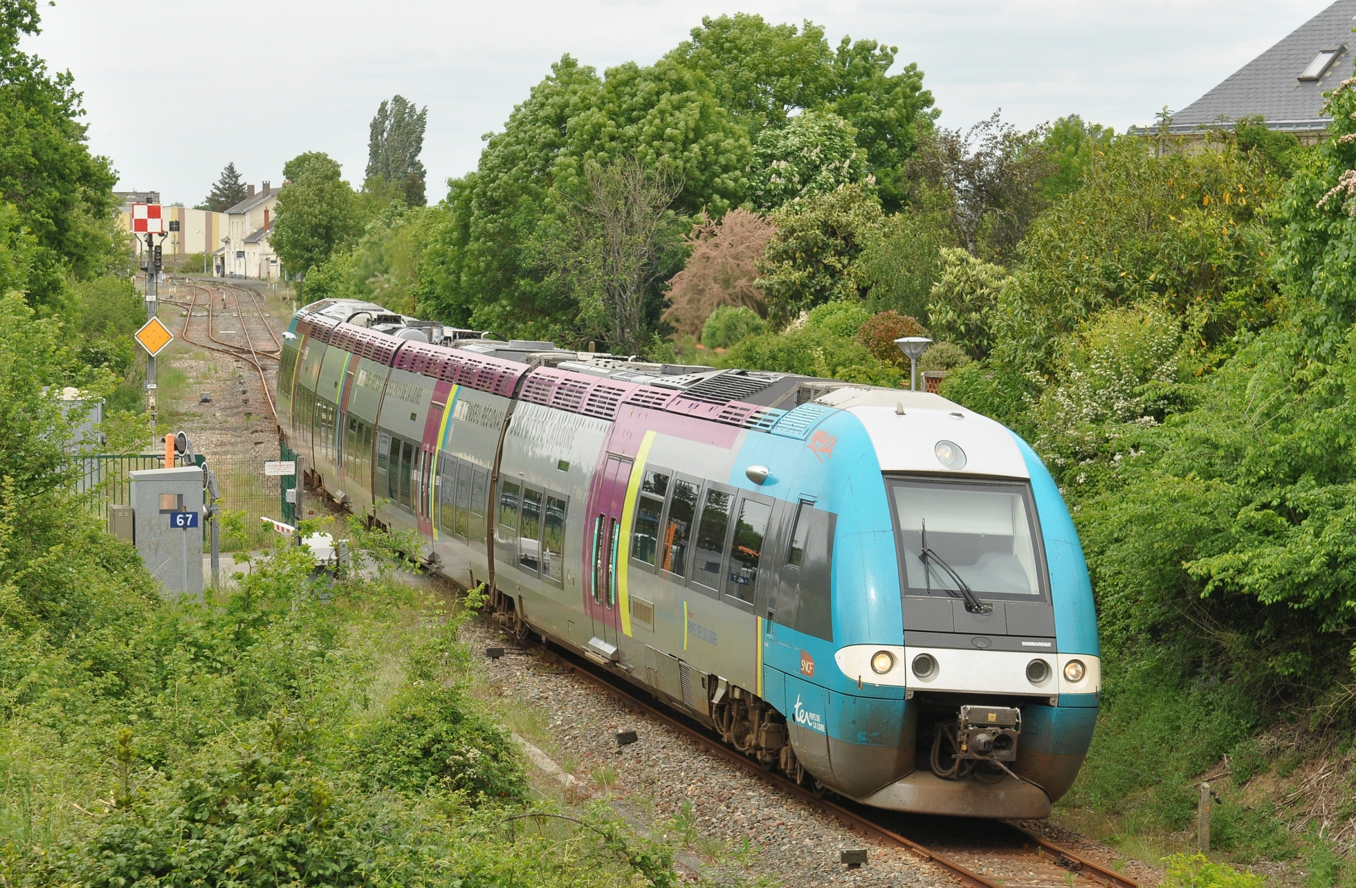 Le train régional La Roche sur Yon - Tours assuré par un X 76500 quitte la Gare de Chantonnay.